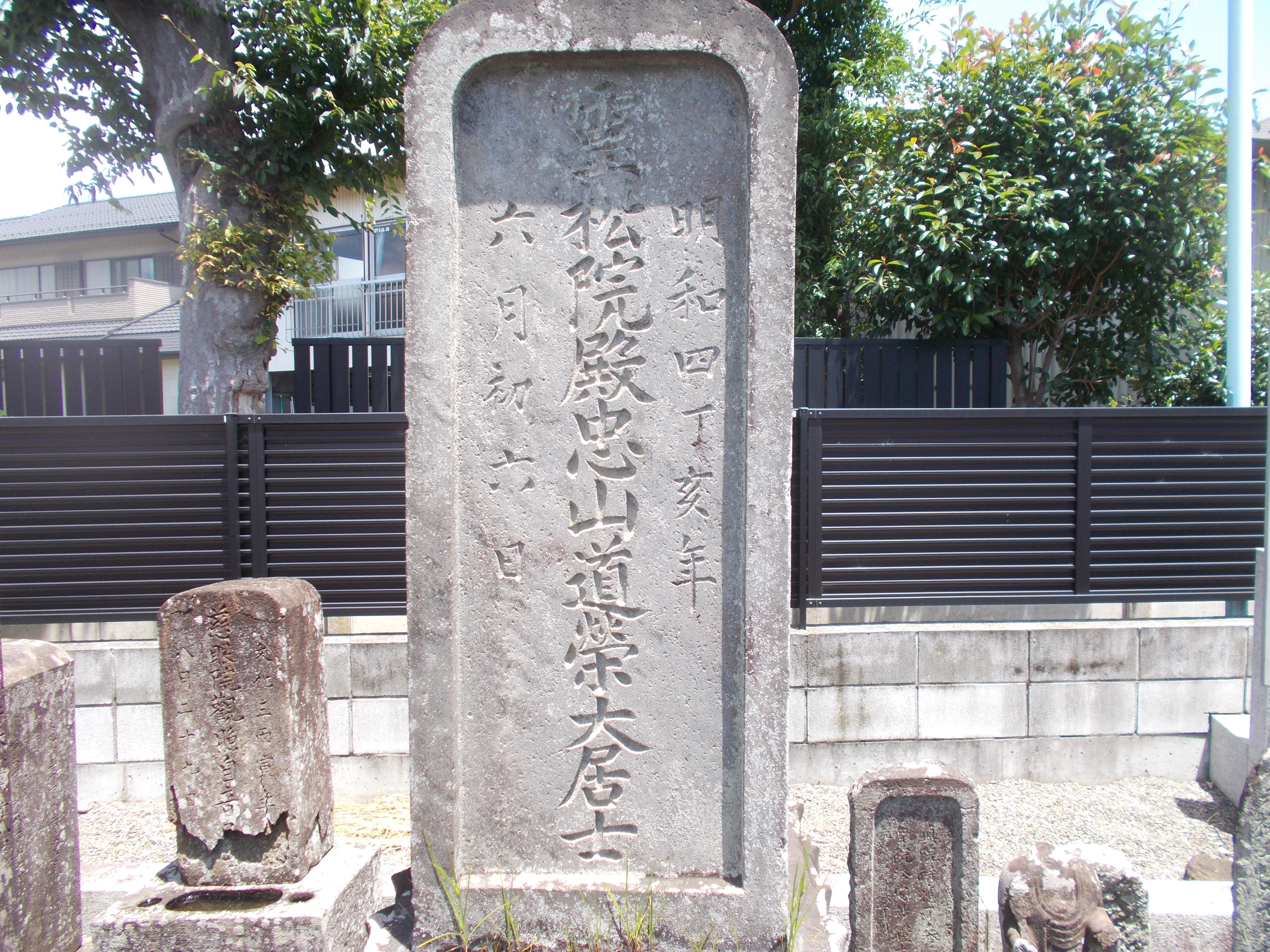 東京都府中市の龍光寺にある川崎平右衛門の墓